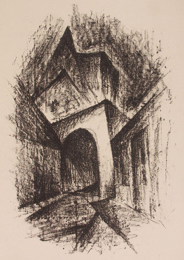 Die Lithografie entstand nach einer Begegnung mit Alfred Kubin in Zwicklledt, die anläßlich eines Treffens der Künstlergemeinschaft „Der Fels“ in Passau im Oktober 1921 stattfand.